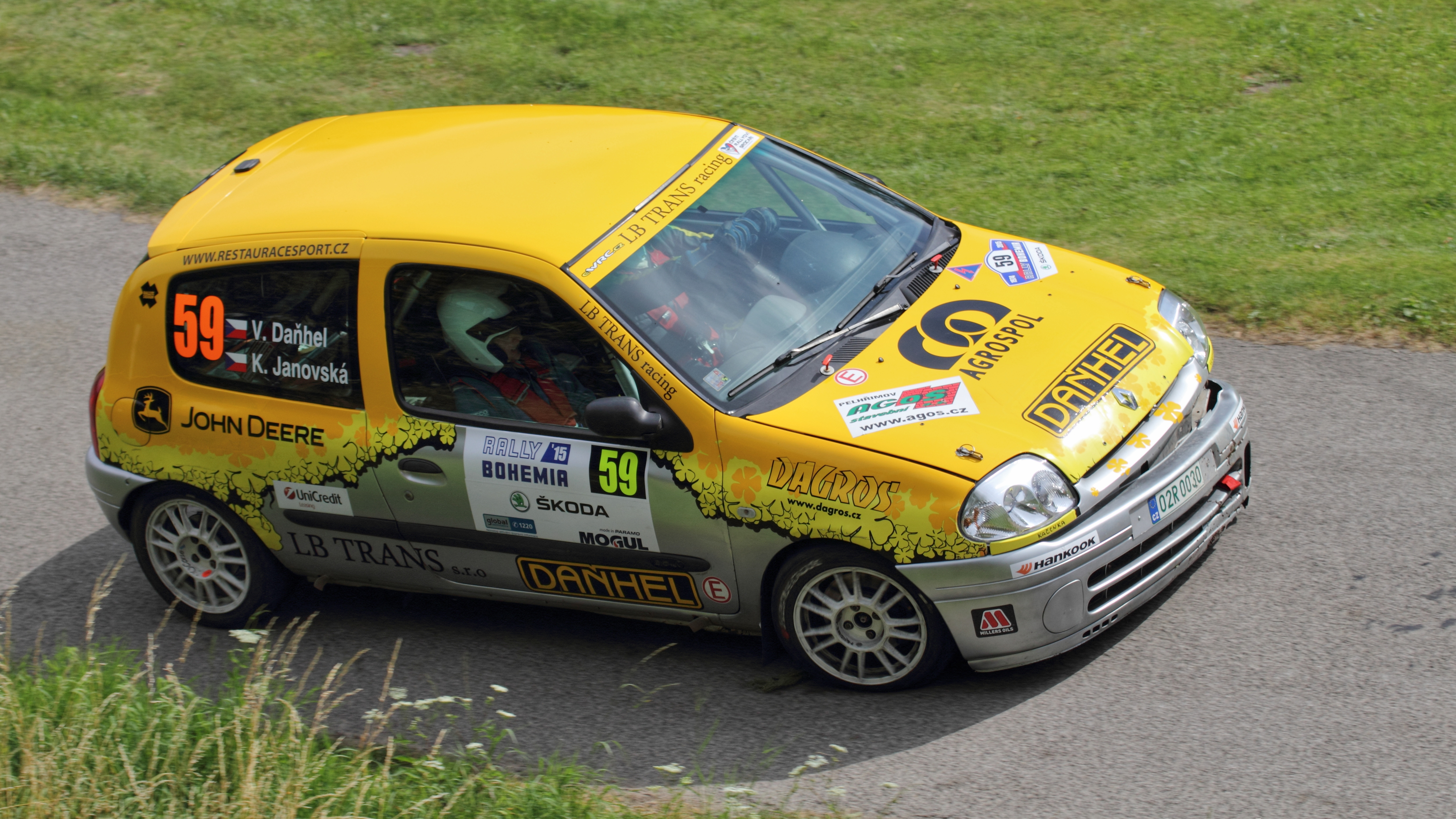 Rally Bohemia 2015 - Daňhel, Renault Clio Sport